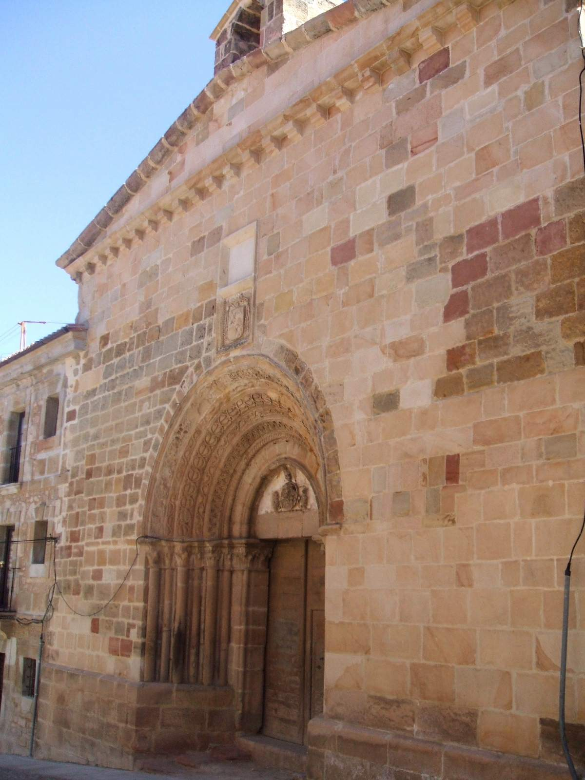 Sigüenza - Iglesia de Santiago